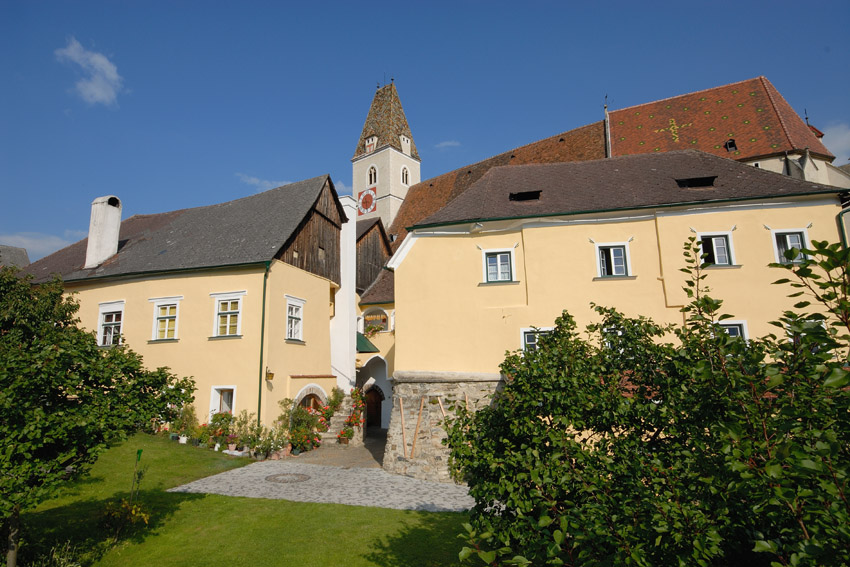 Mauritiushof, Kirchenplatz 13, Spitz an der Donau, Niederösterreich